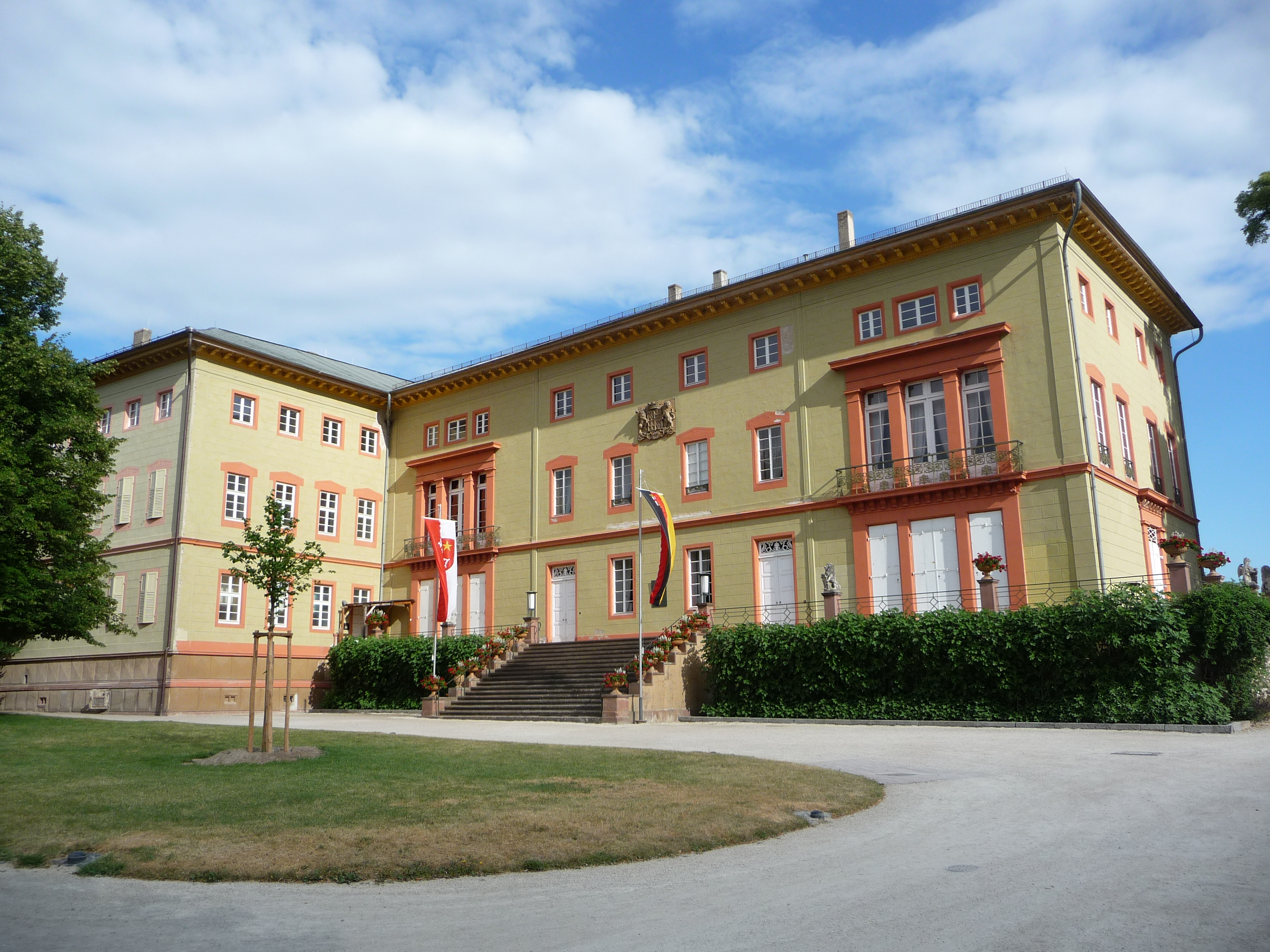 Herrnsheimer Schloss aus dem 19. Jahrhundert im Wormser Stadtteil Herrnsheim in Rheinland-Pfalz